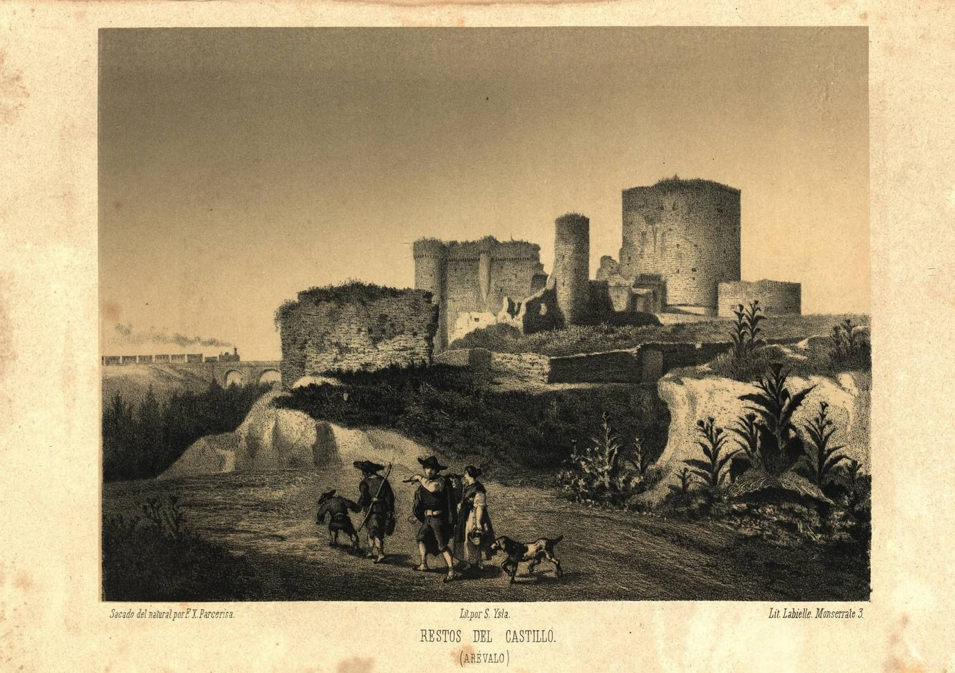 Litografía de Francisco Javier Parcerisa del Castillo de Arévalo, España, publicada en el año 1865.